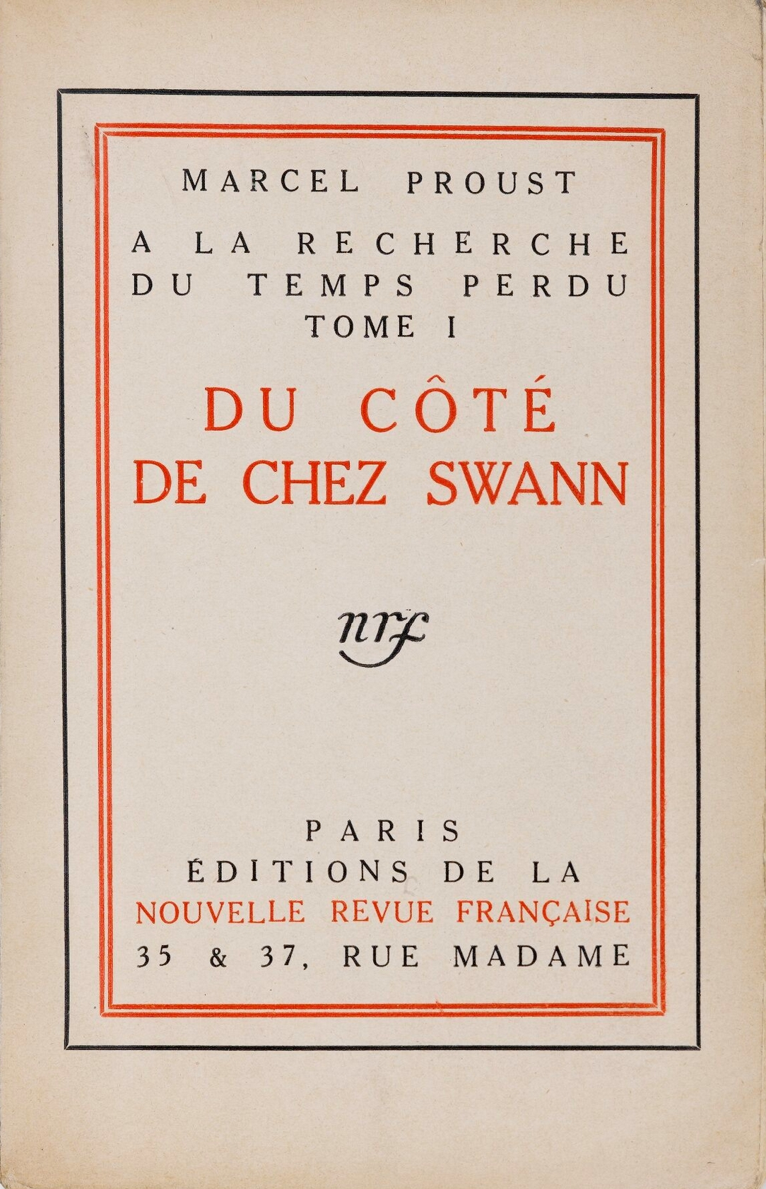 Du coté de chez Swann, première édition chez Gallimard, 1917